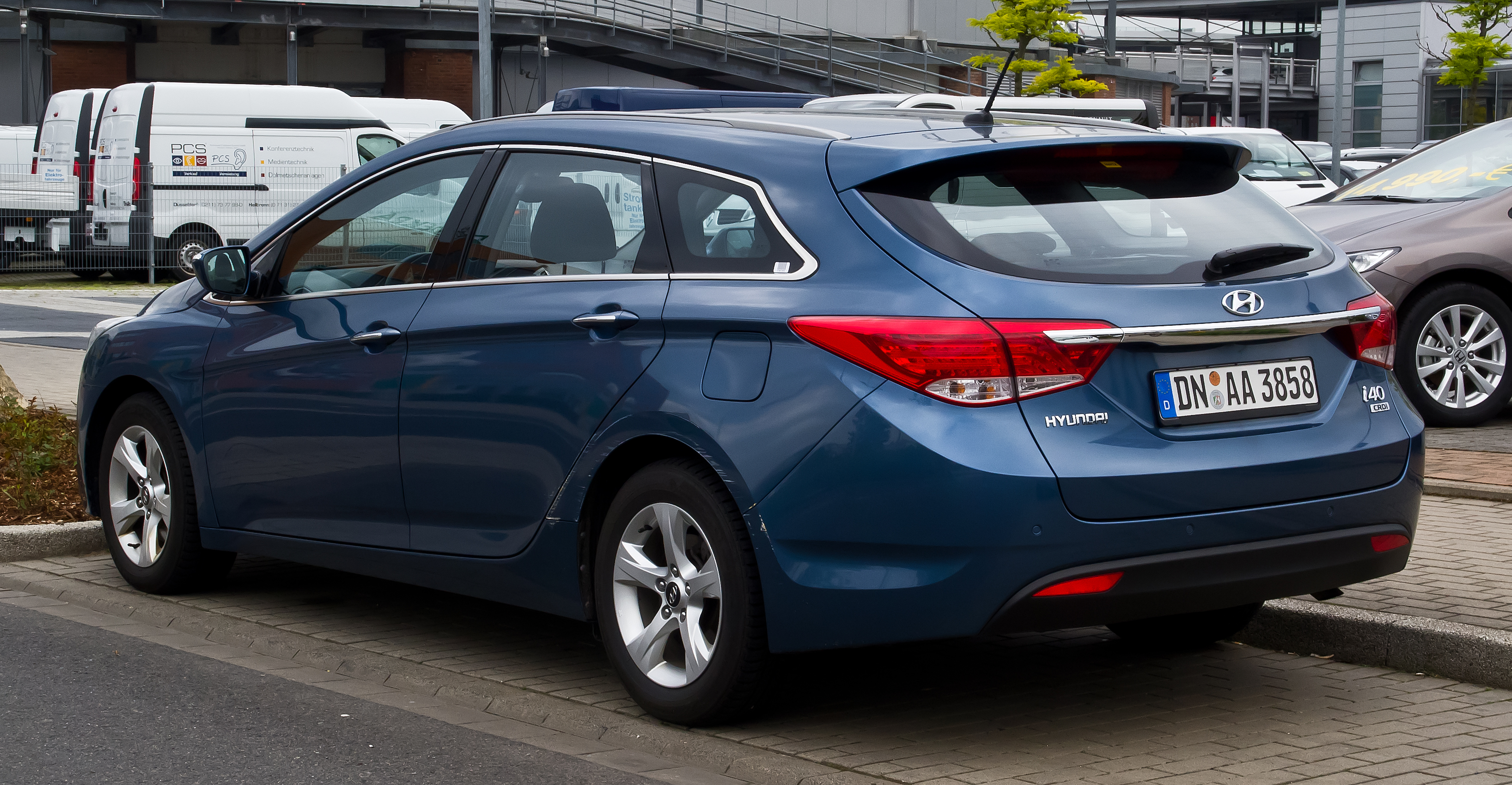 Hyundai i40 Kombi 1.7 CRDi Style